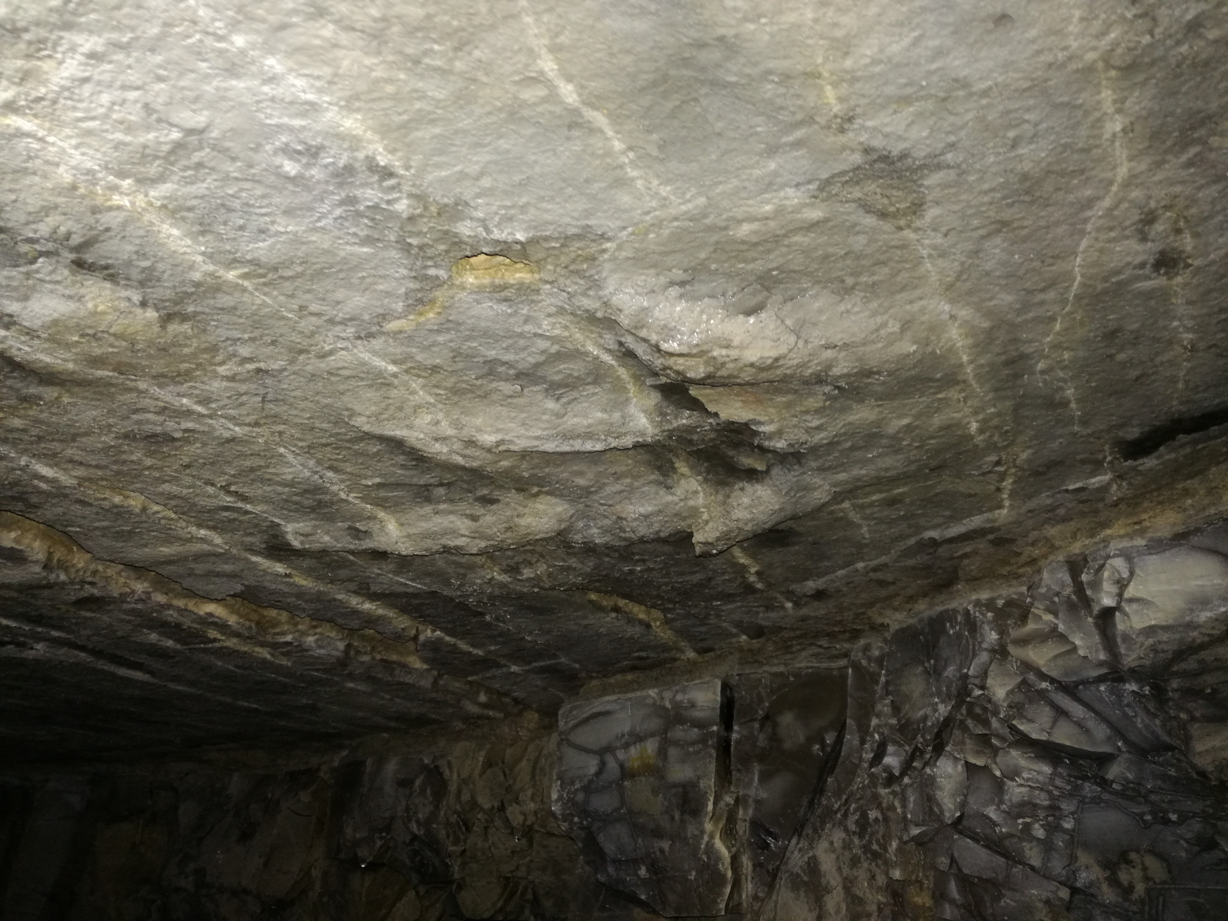 Dinosaurierfährte Monte Buso - Pasubio Italien